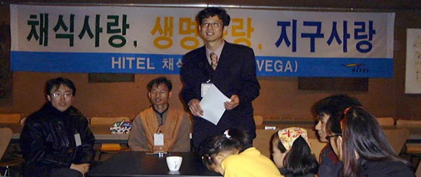 한국 최초의 채식동호회인 하이텔 채식동호회의 첫 모임. 1999년 안국동 느티나무 카페에서